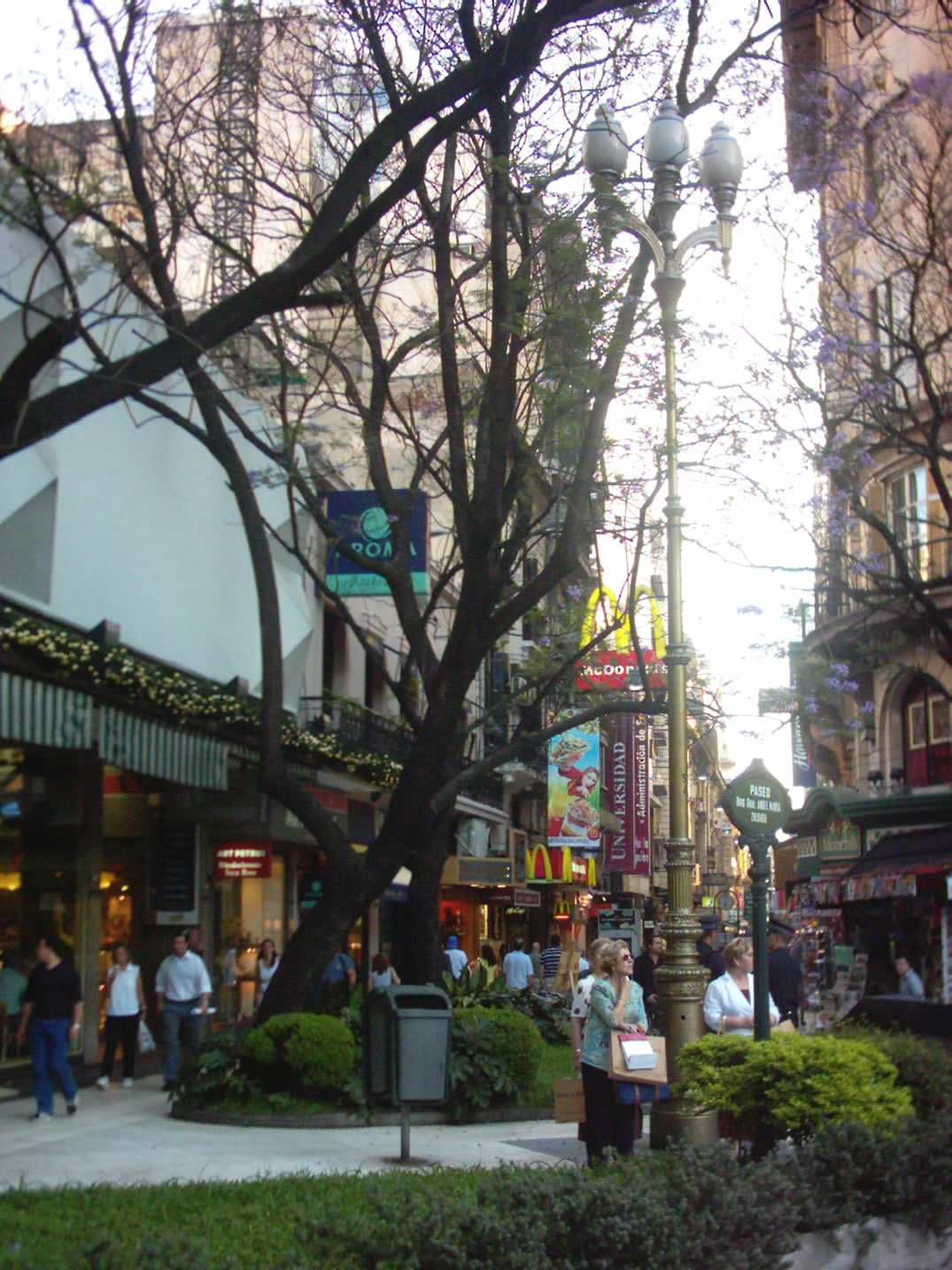 Vista del extremo norte de la calle Florida, a metros de la Plaza San Martín, barrio de Retiro.